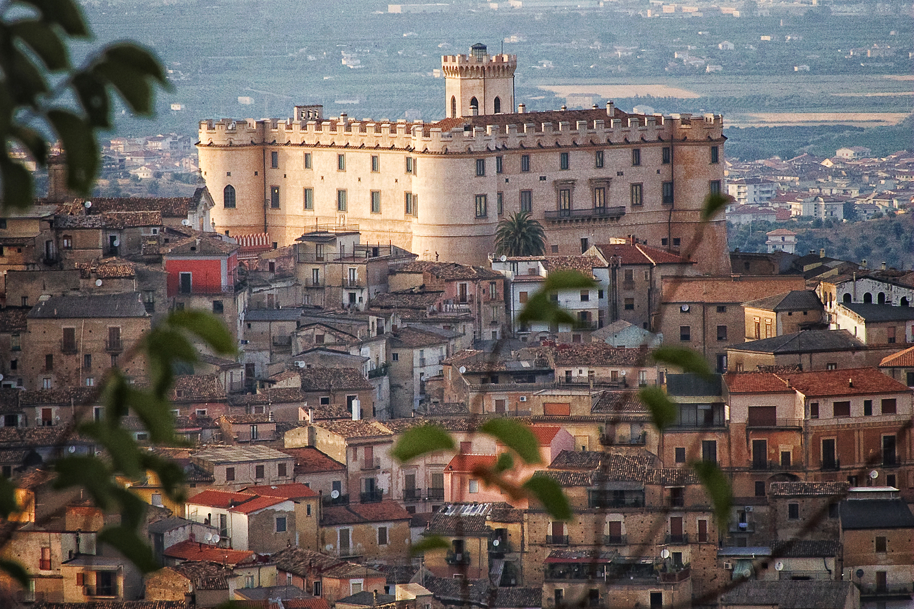 Castello Ducale This is a photo of a monument which is part of cultural heritage of Italy.